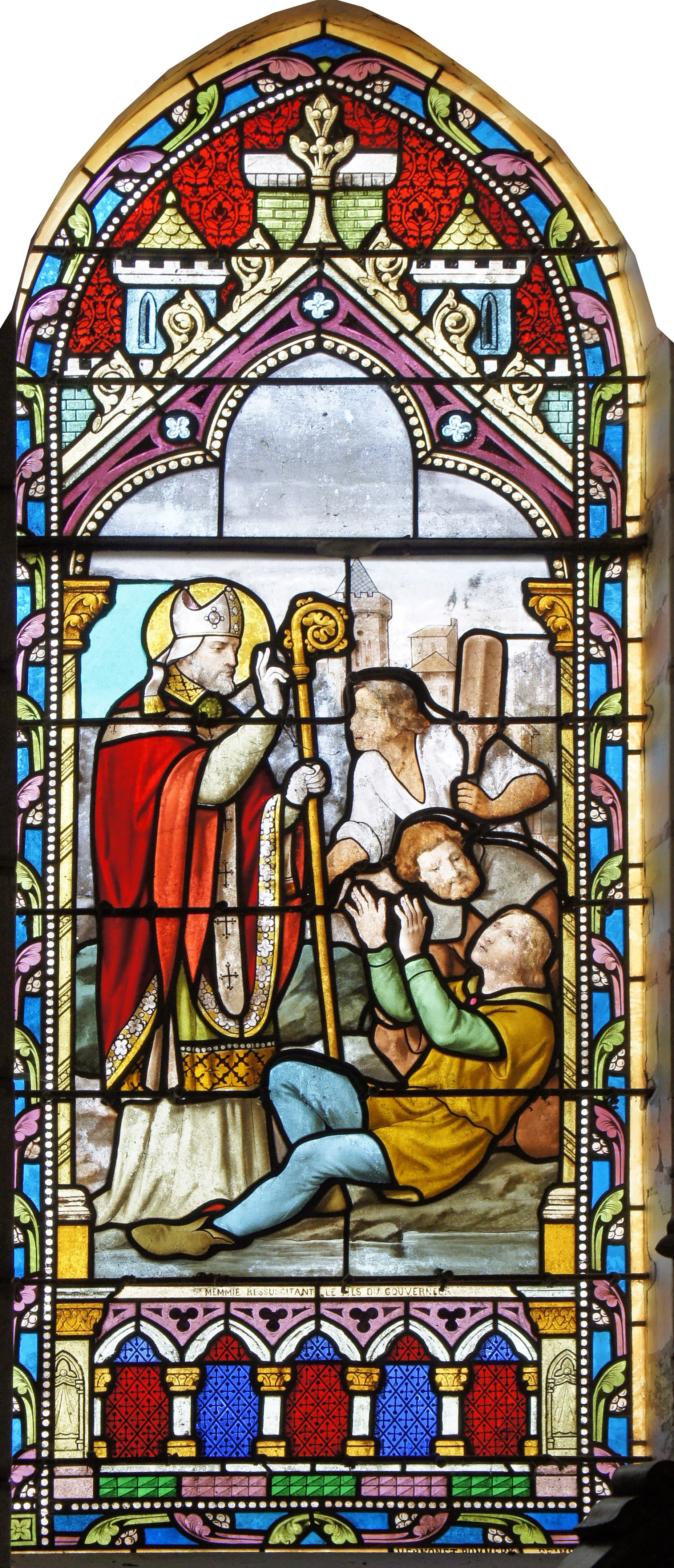 Vitrail représentant Memmie de Châlons .